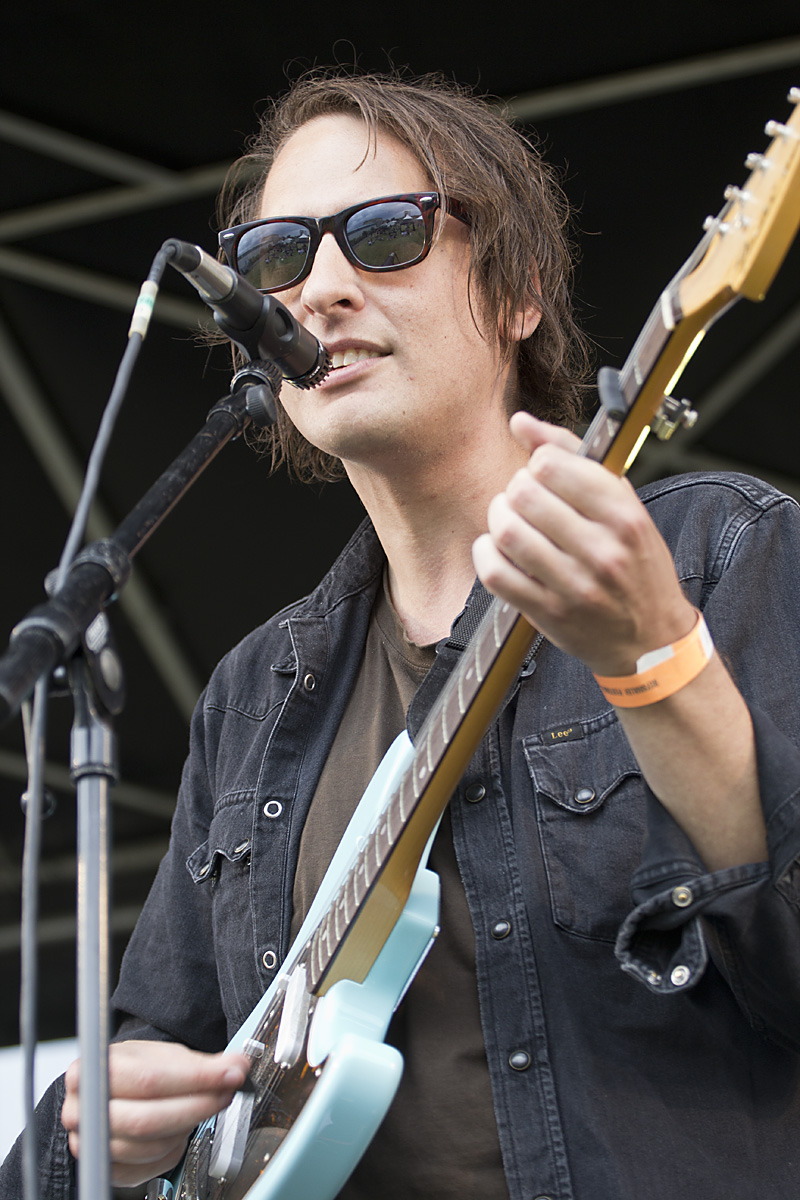 The Setting Son, alias Sebastian Kristiansen